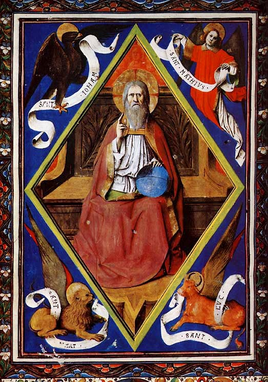 Martins_canon1gd[1].jpg